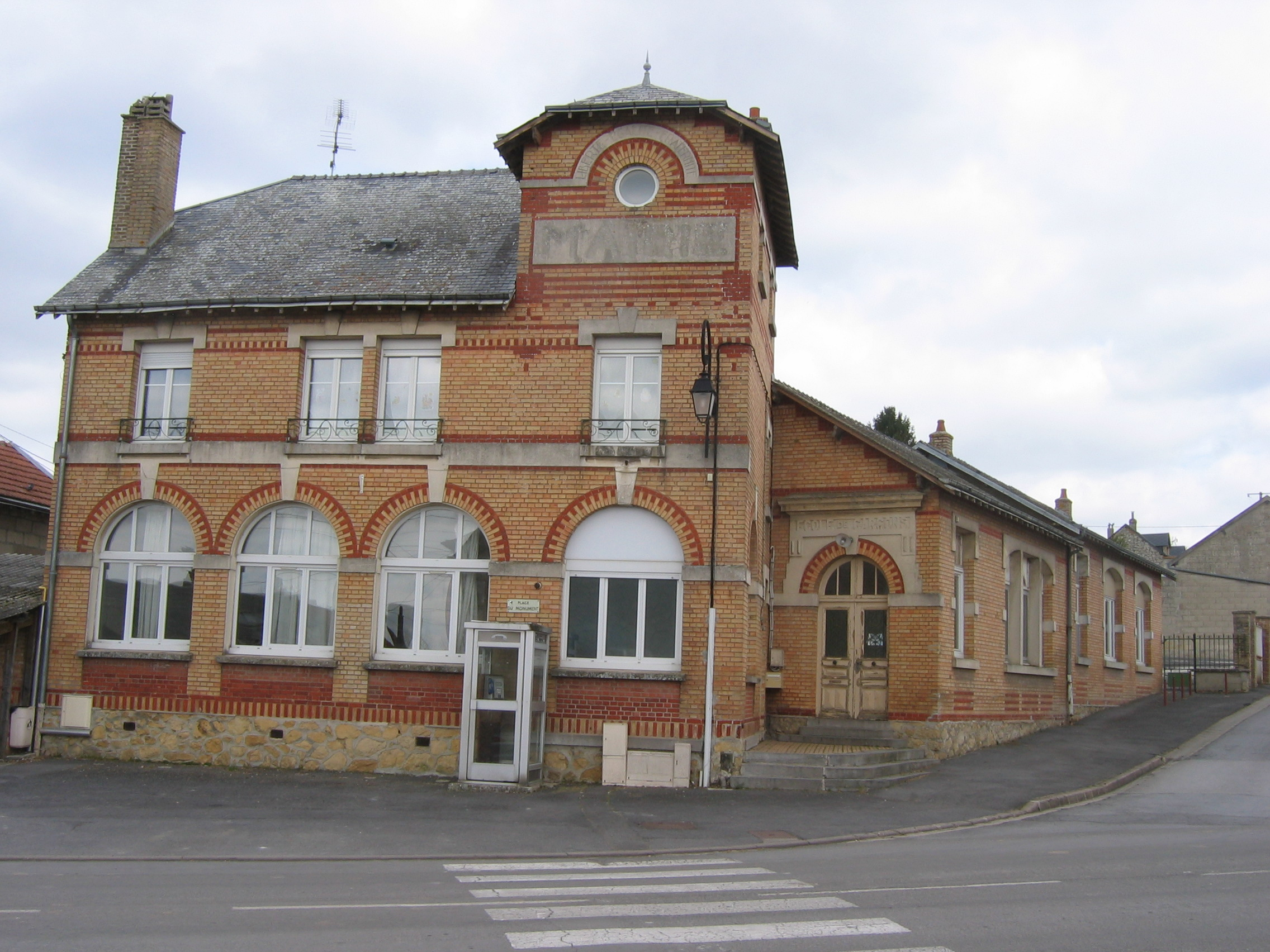 Ecole du village de Saint-Germainmont en Ardennes (France)